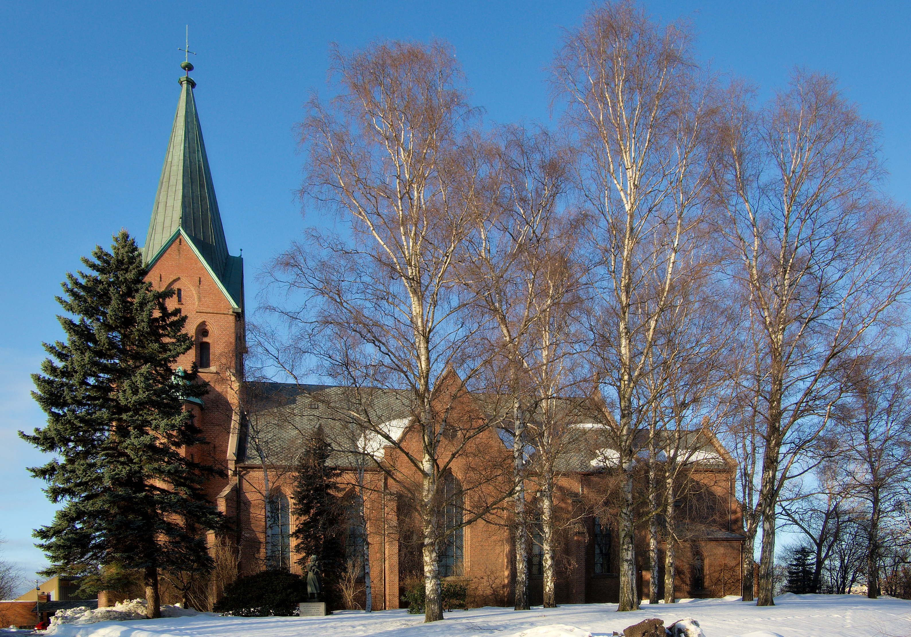 Vestre Aker church in Oslo.